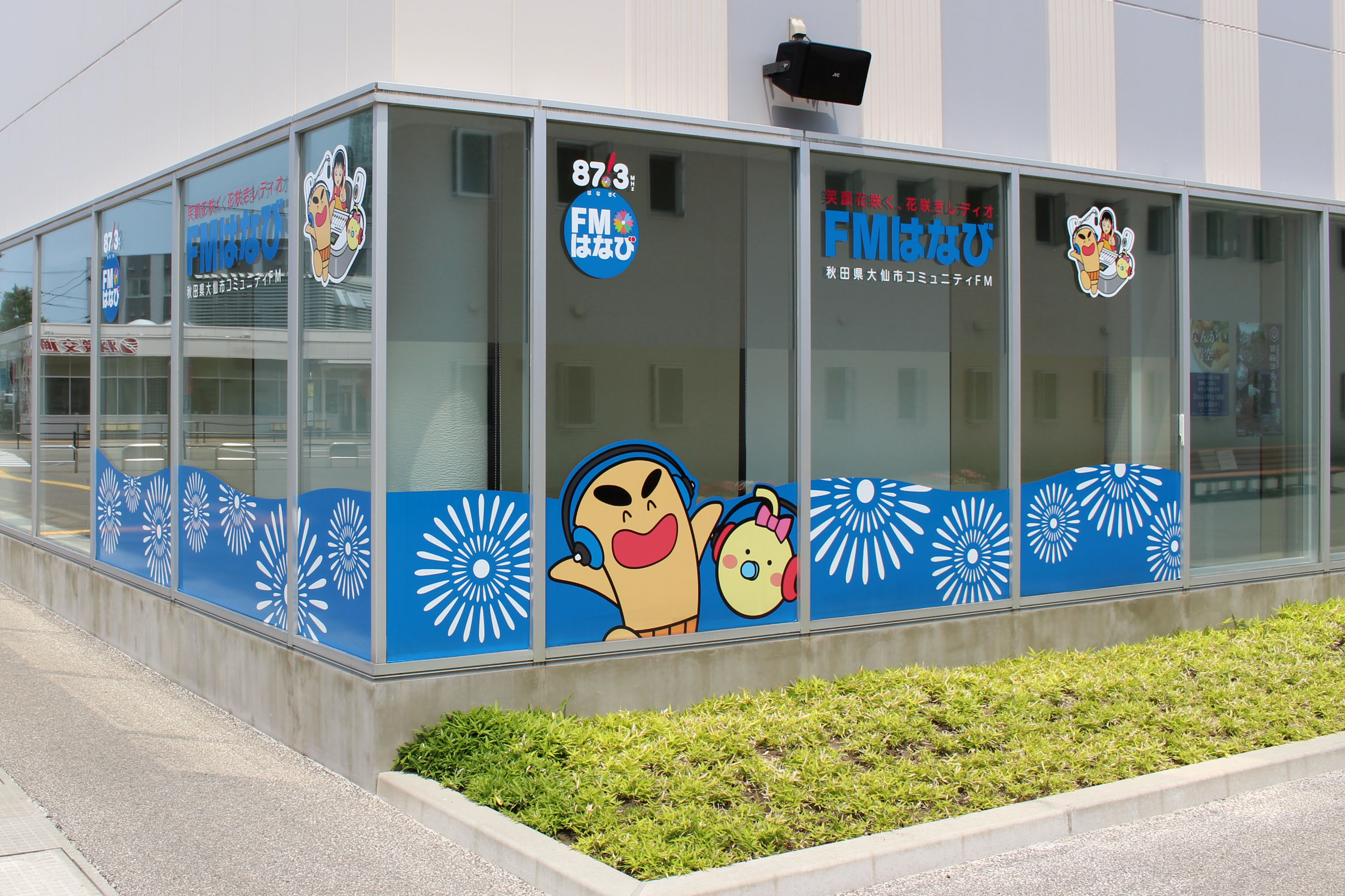 FMはなび（秋田県大仙市）